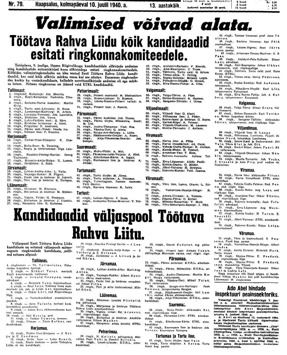 Ajaleht Lääne Elu, lk 1. 1940. aasta Riigivolikogu valimistele esialgselt esitatud kandidaadid.